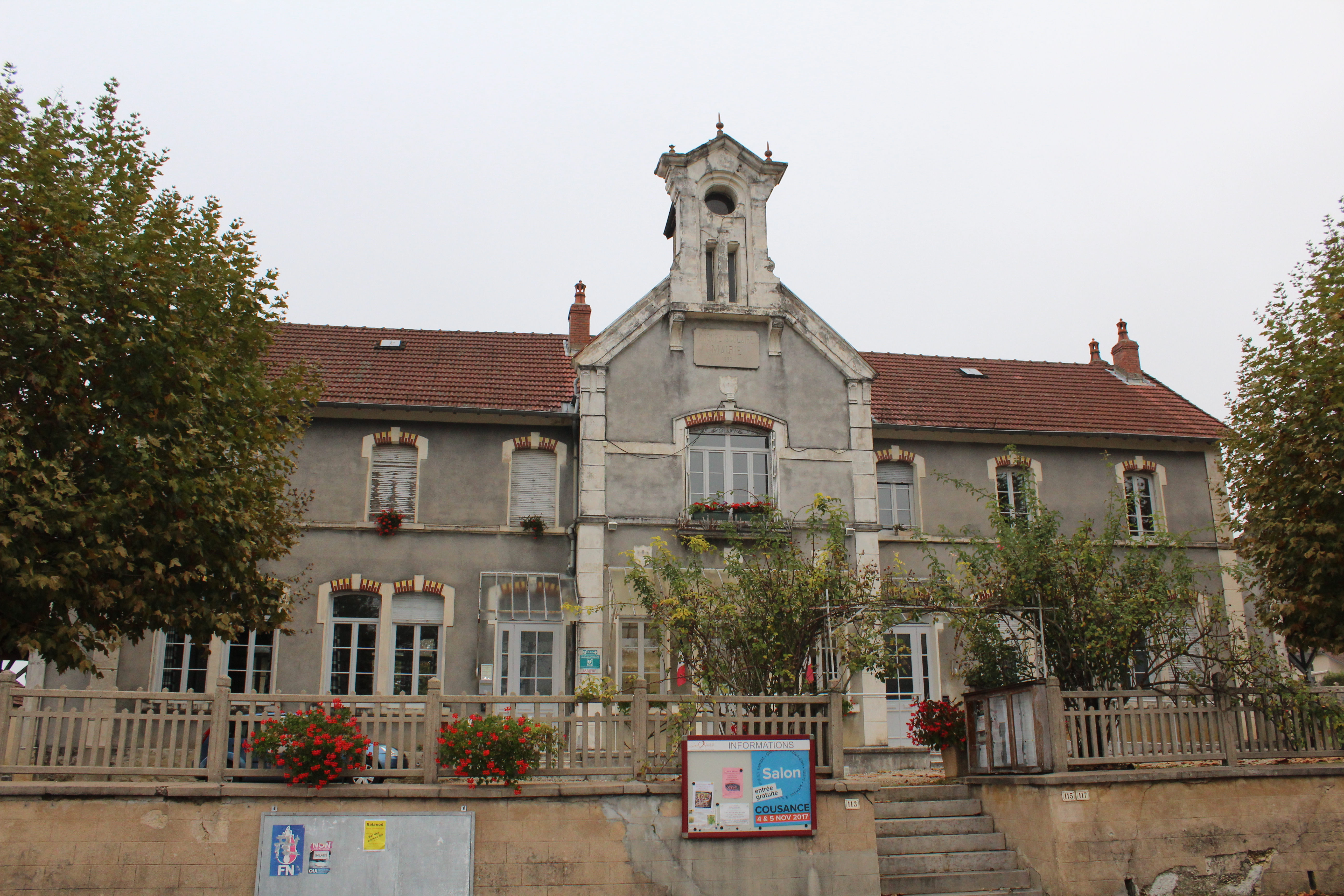 Mairie de Nanc-lès-Saint-Amour, Les Trois-Châteaux.